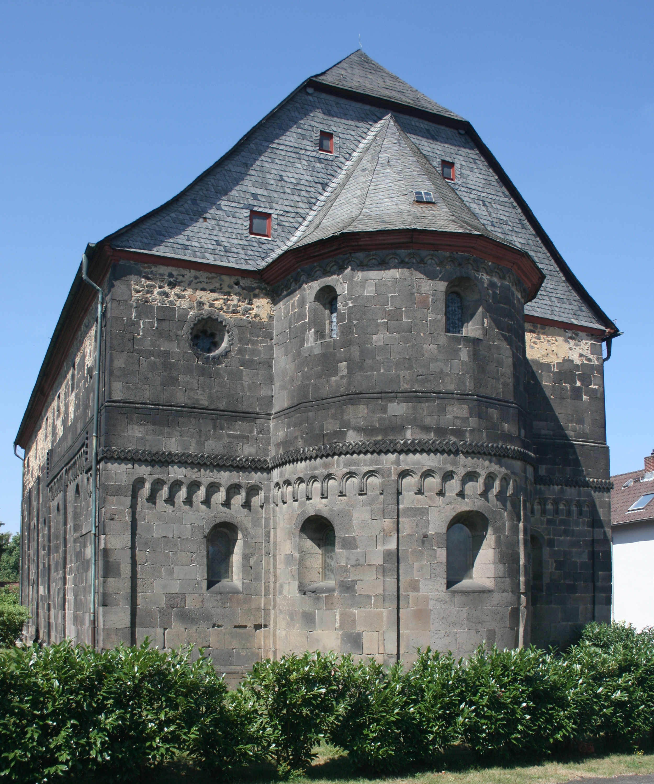 Komturkirche Nieder-Weisel, Stadt Butzbach, Wetteraukreis, Hessen, Ansicht von Osten.